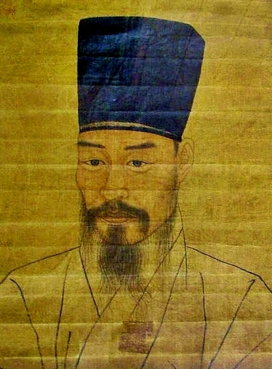 1750년에 그려진 조광조 영정